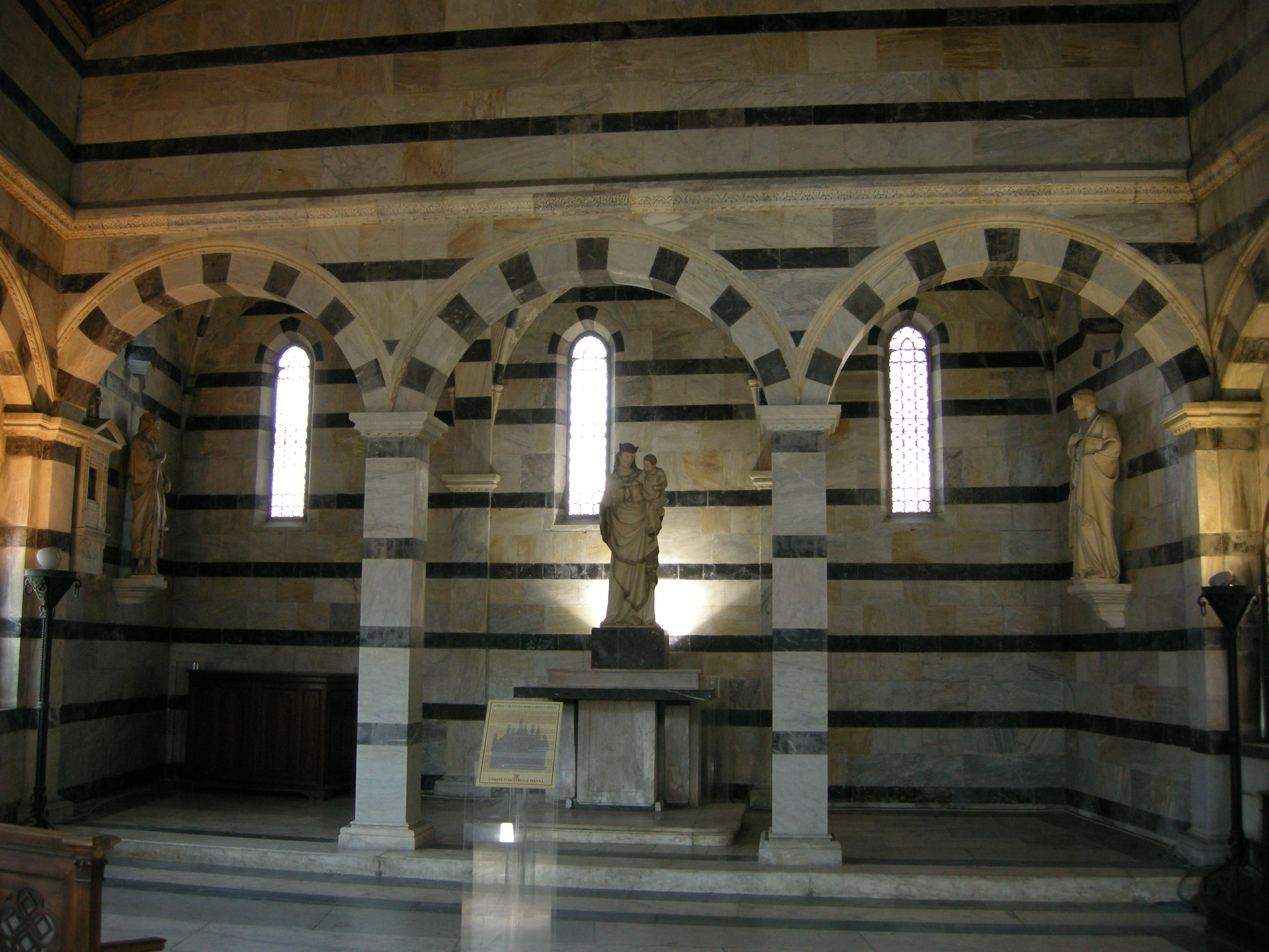 Santa maria della spina, interno